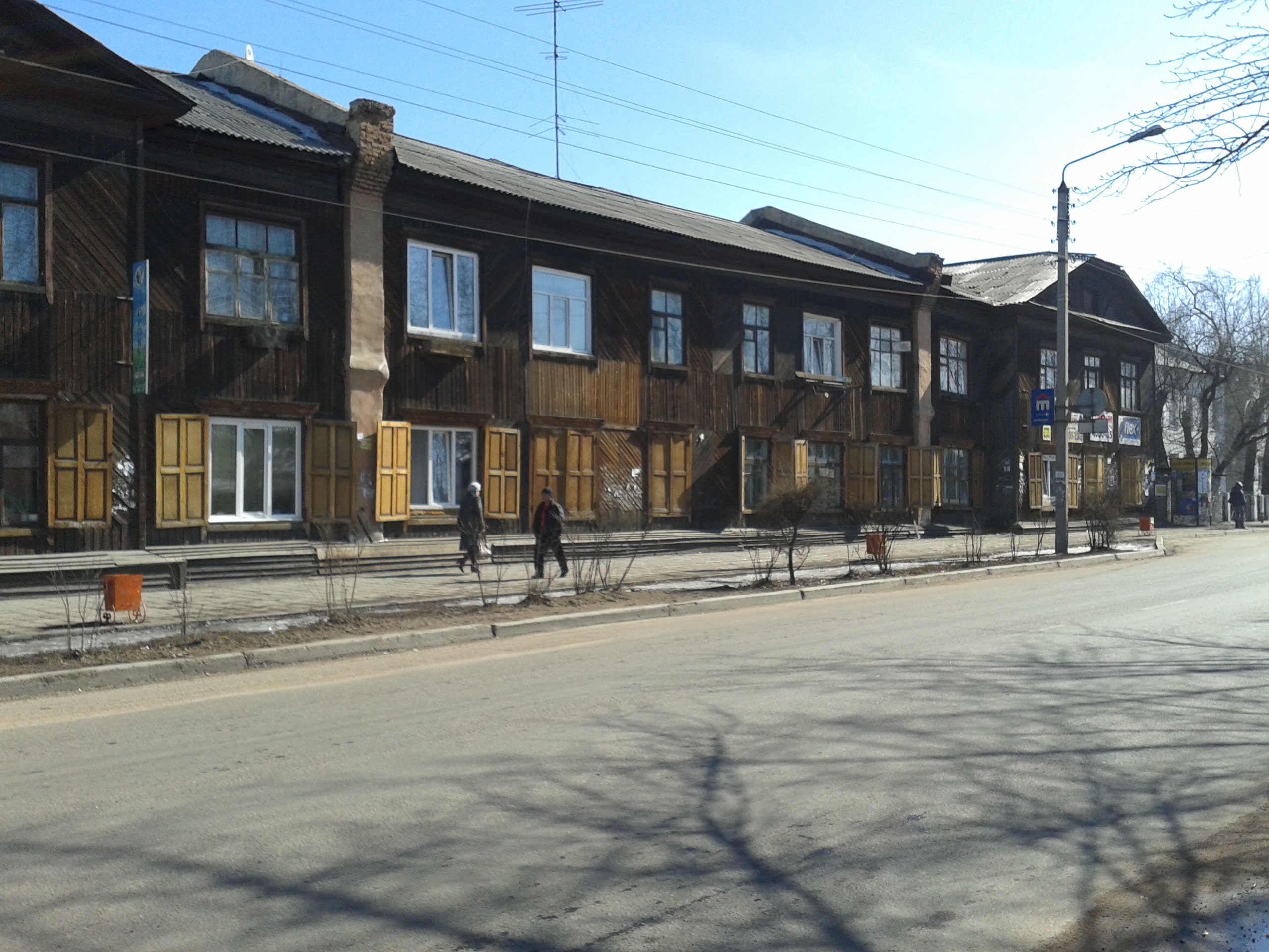 Ряд старинных зданий по улице Смолина в Улан-Удэ, с противопожарными перегородками.